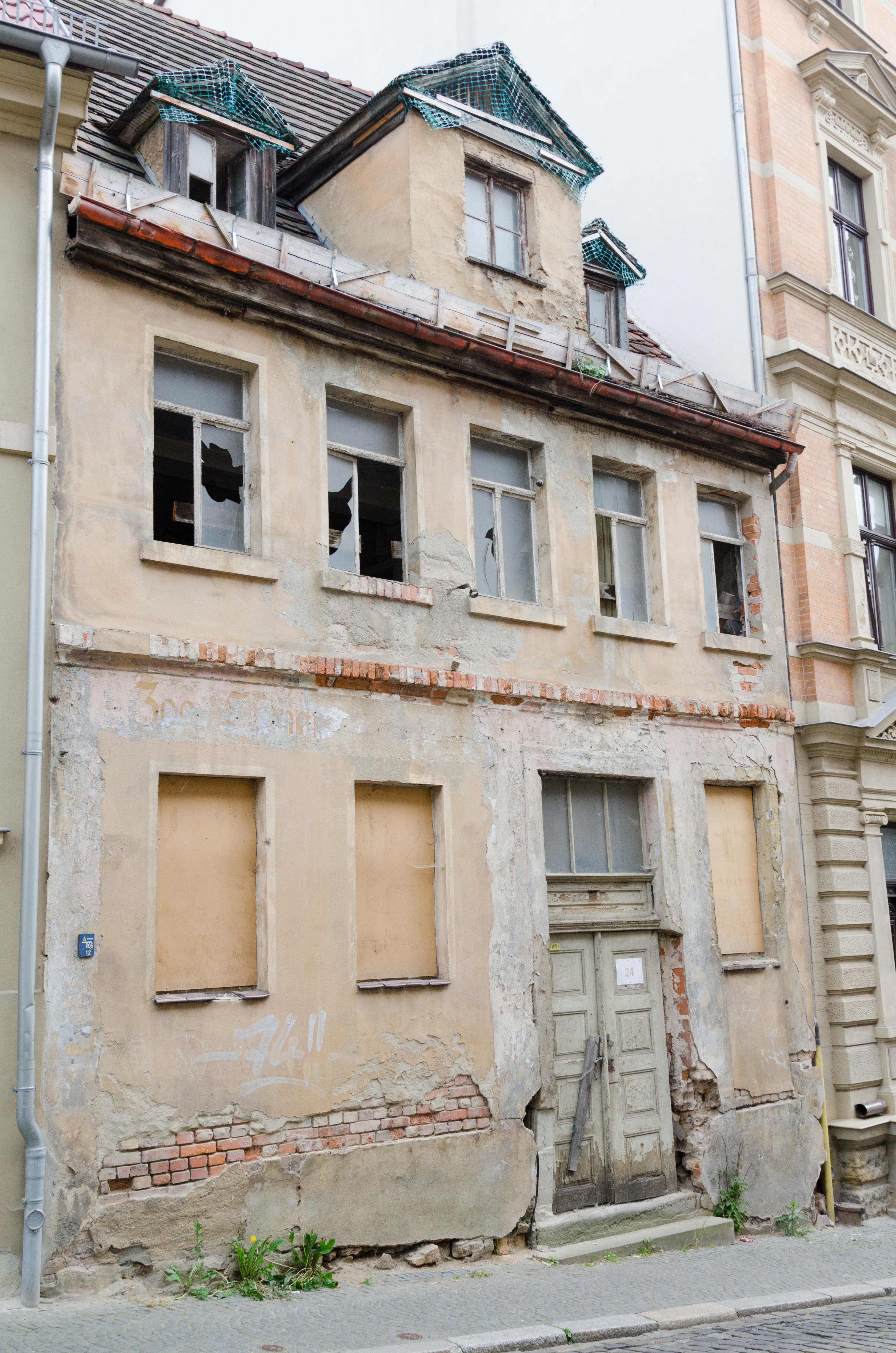 Zeitz, Messerschmiedestraße 24